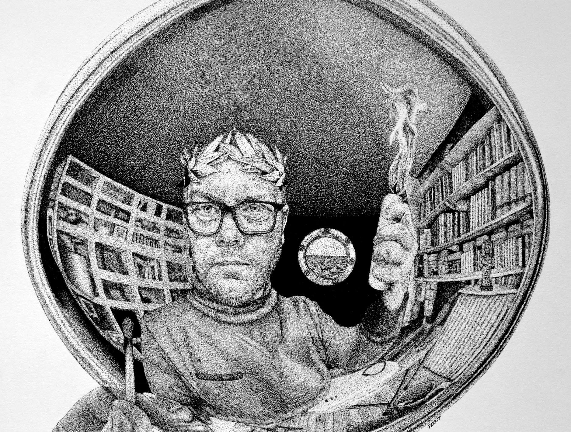 Portrait de Nicolas Le Golvan Plume et encre noire Rohrer & Klingner Papier LANA 220g/m² 29,7 x 42 cm. Anthony PERROT© 2018